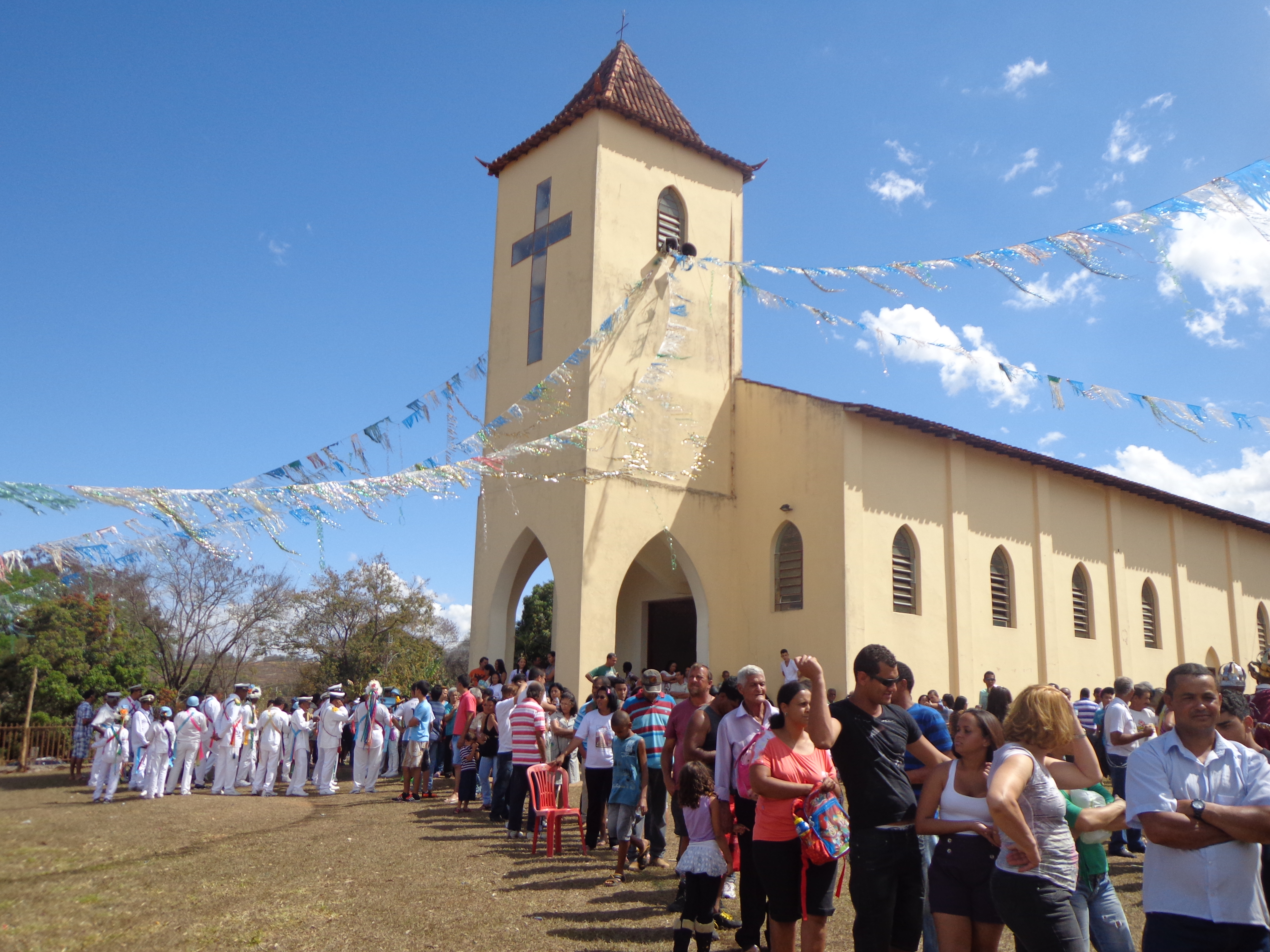 Festa de Nossa Senhora do Rosário - Distrito da Lapinha Lagoa Santa/MG (Acervo Prefeitura Municipal de Lagoa Santa)